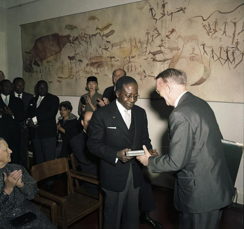 Staatspräsident von Senegal Senghor Besuch in Frankfurt am Main